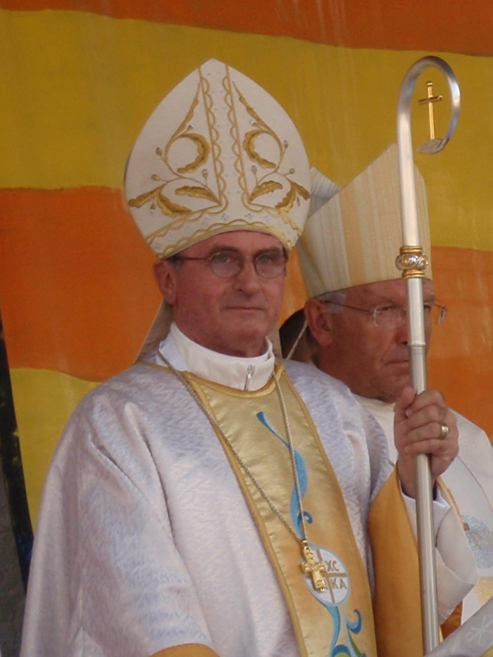 Juliusz Janusz (cropped image)